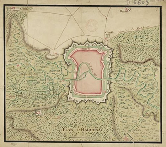 Plan de Haguenau (1700)